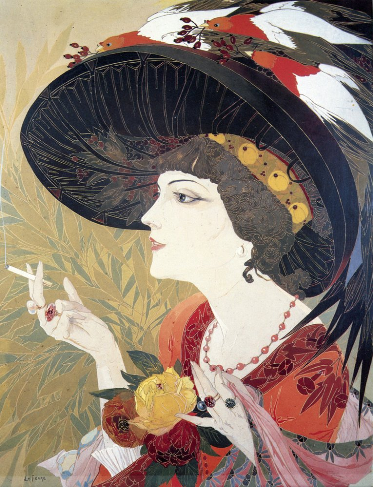 La Fumeuse